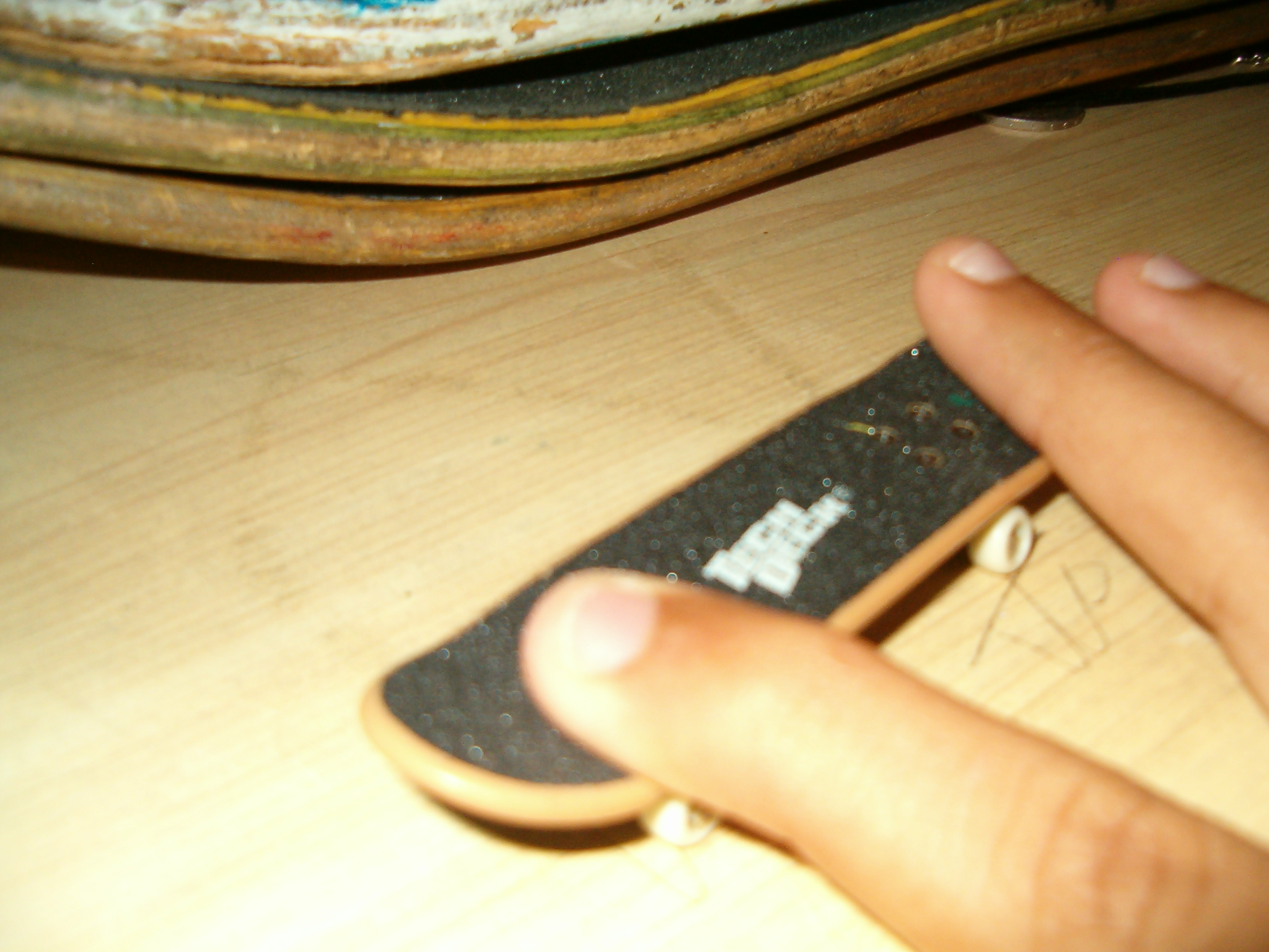 טריק עם סקייט אצבעות. צילם י.ש. 00:01, 21 אפריל 2006 (IDT)